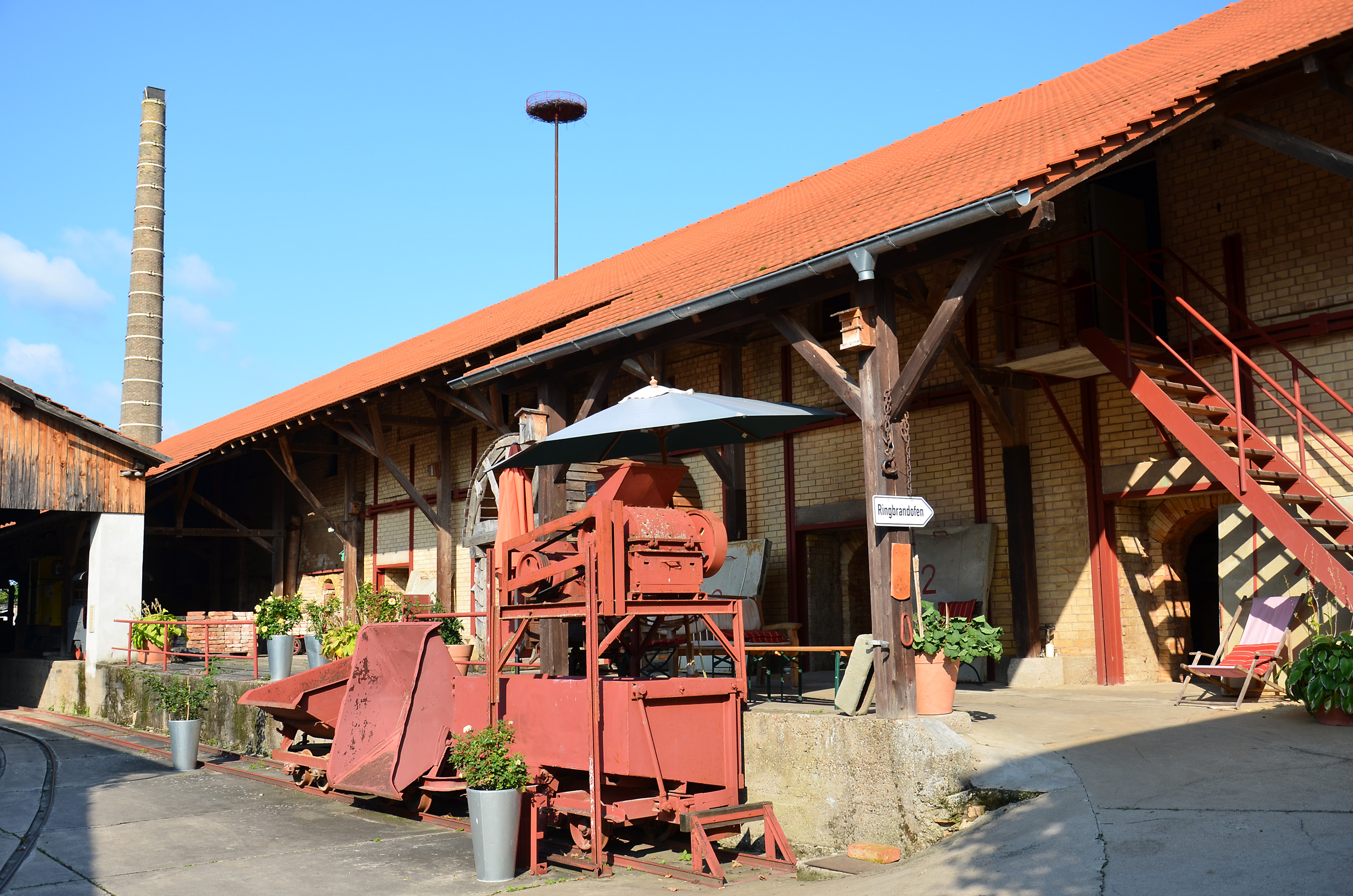 Ziegeleimuseum Sondernheim